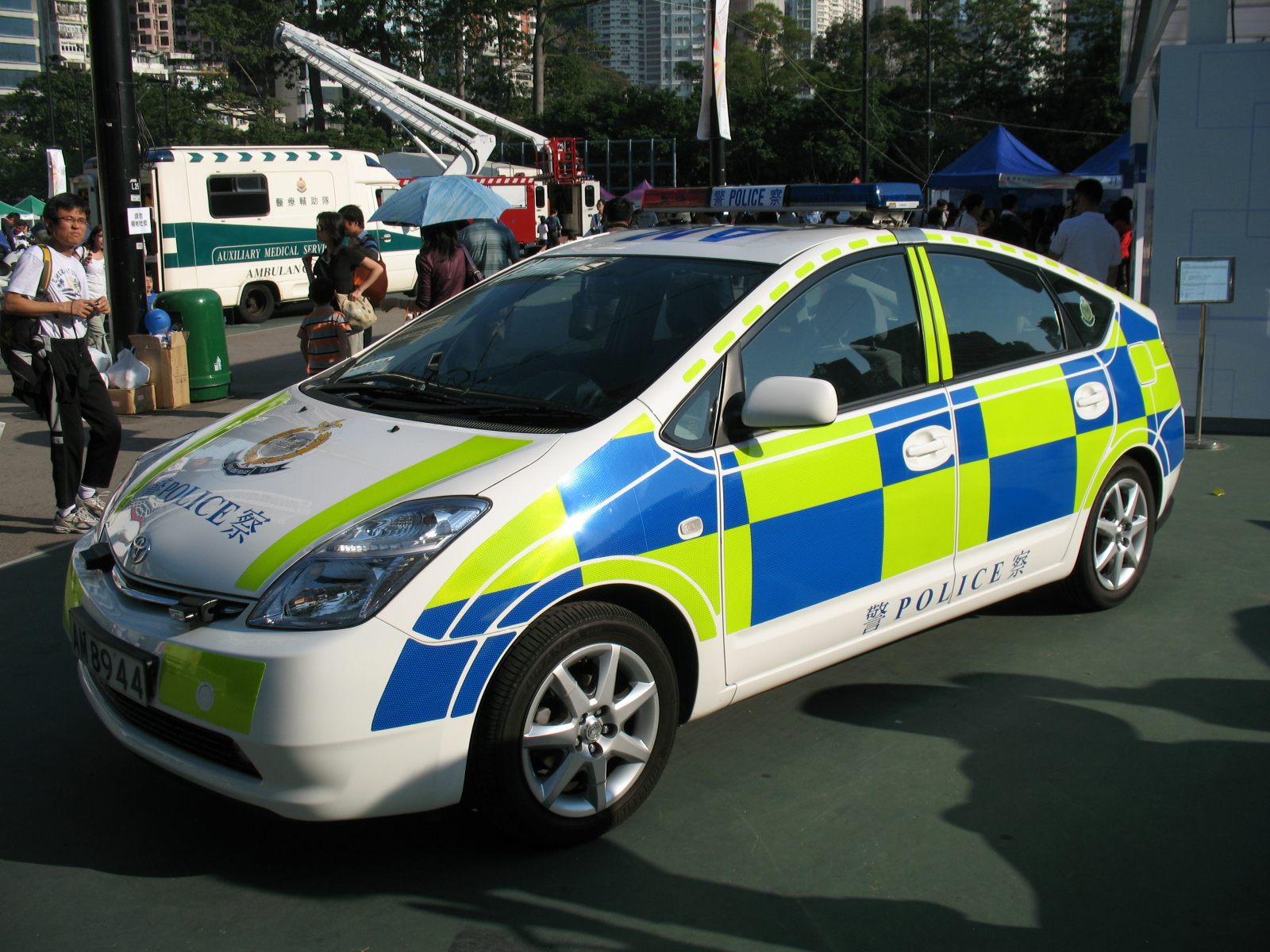 中文（香港）: 香港首批混能型巡邏警車現已投入服務，型號是豐田普銳斯混能型房車，於2008年11月16日在港島銅鑼灣維多利亞公園硬地足球場舉行的「科學為民嘉年華會2008」中亮相。